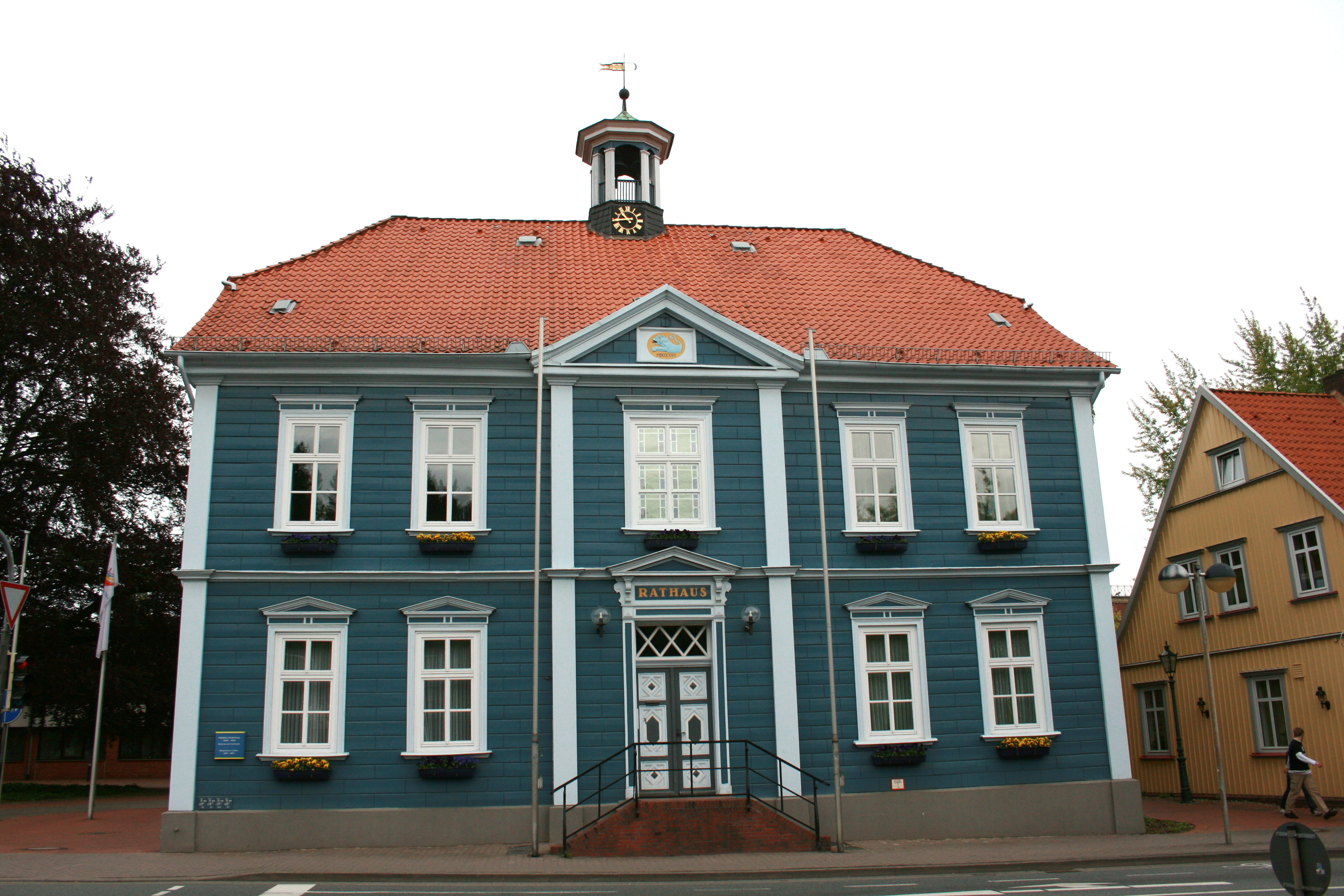 Altes Rathaus an der Poststraße in Soltau